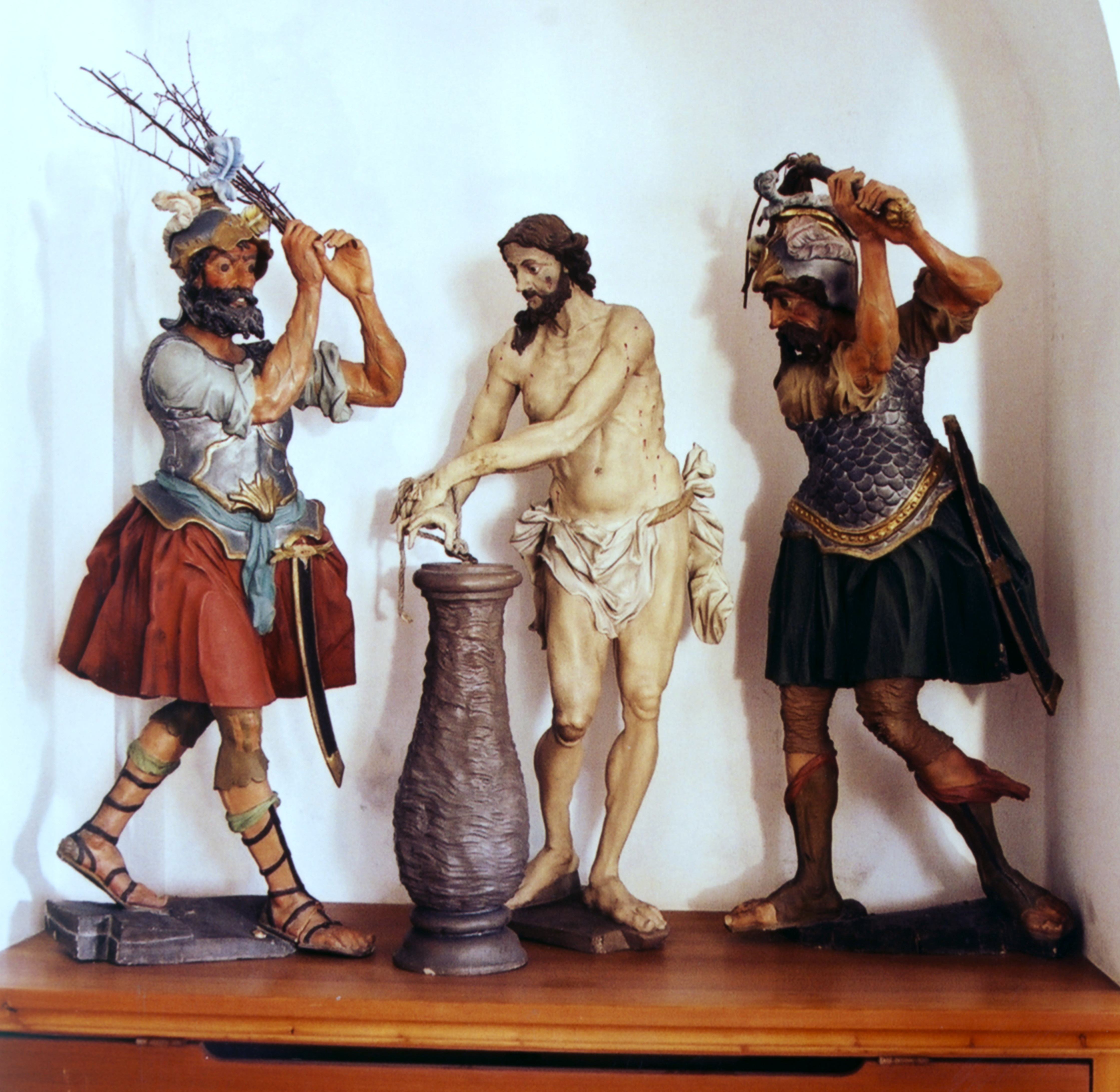 "Geißelung" von Jakob Witwer in der Pfarrkirche (Unterkirche) in Lermoos (Tirol)